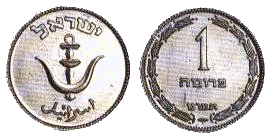 Аверс и реверс израильской монеты 1 прута 1950 года выпуска